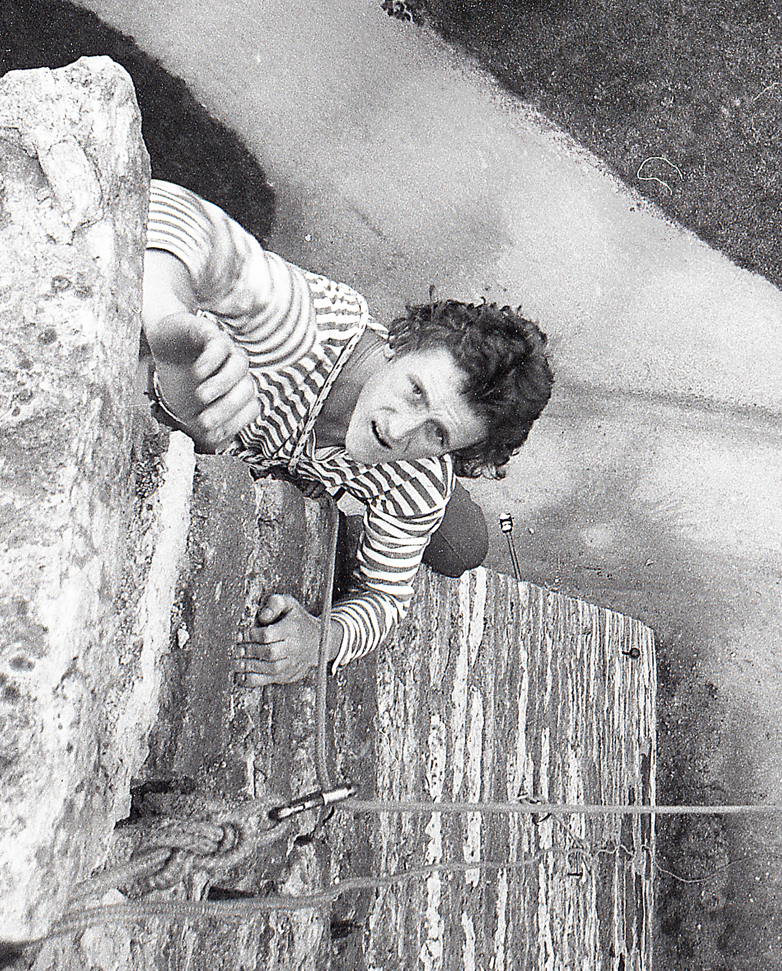 Vladimir Meema Hirvepargi seinal